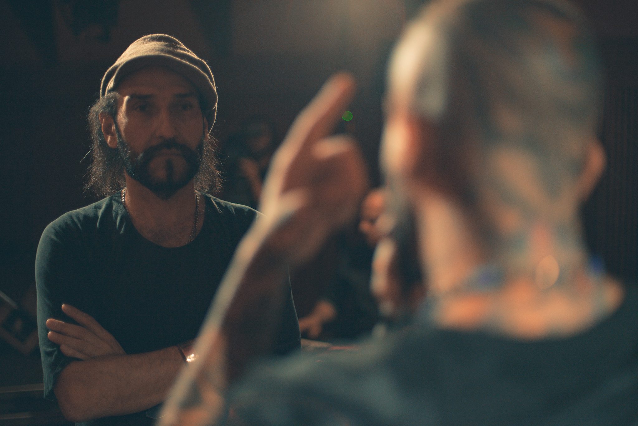 عکس توسط پوریا افخمی در شهر تفلیس ثبت شده است.